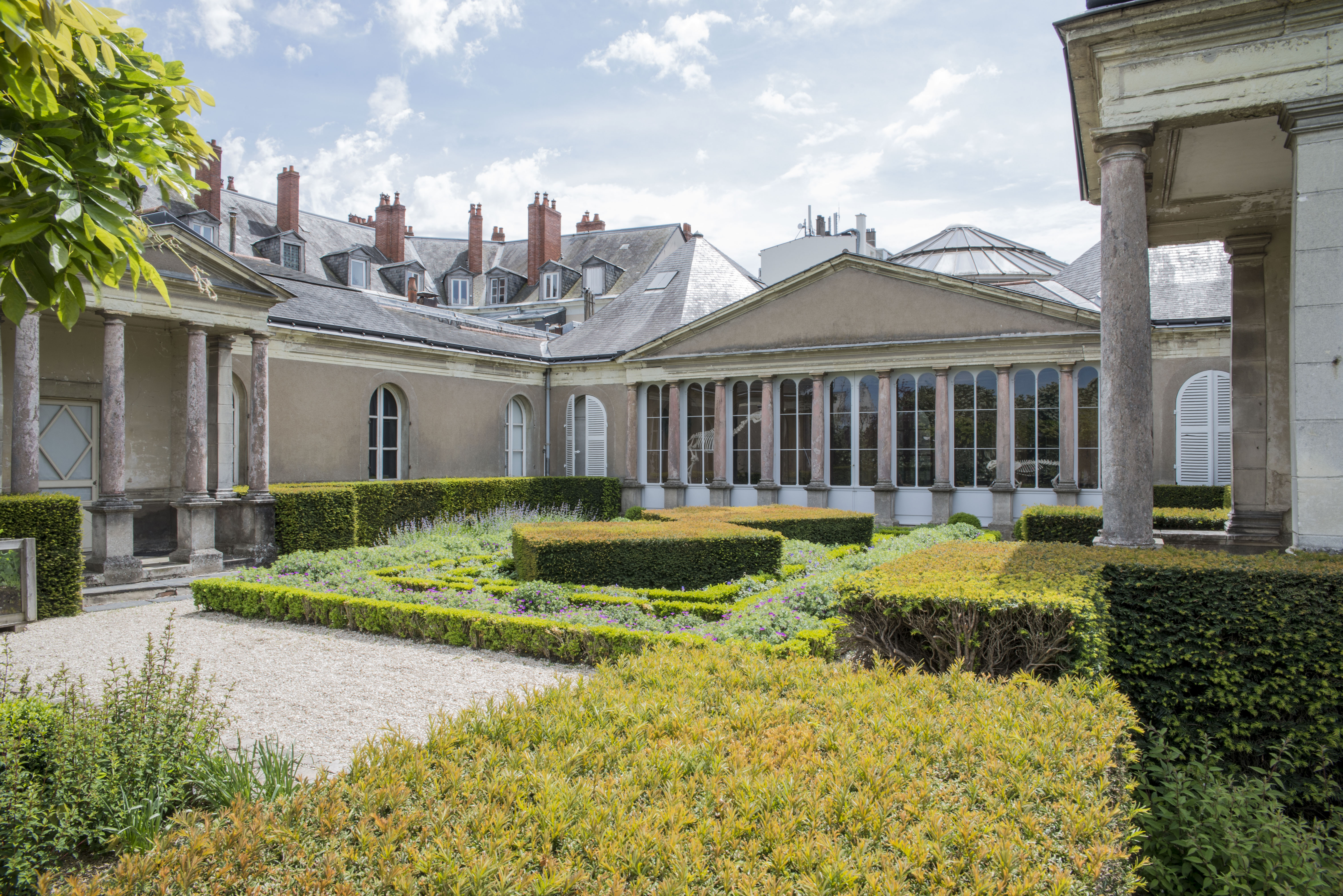 Jardin et colonnade de l'hôtel Demarie du Muséum des sciences naturelles d'Angers (Maine-et-Loire, France), 2017.